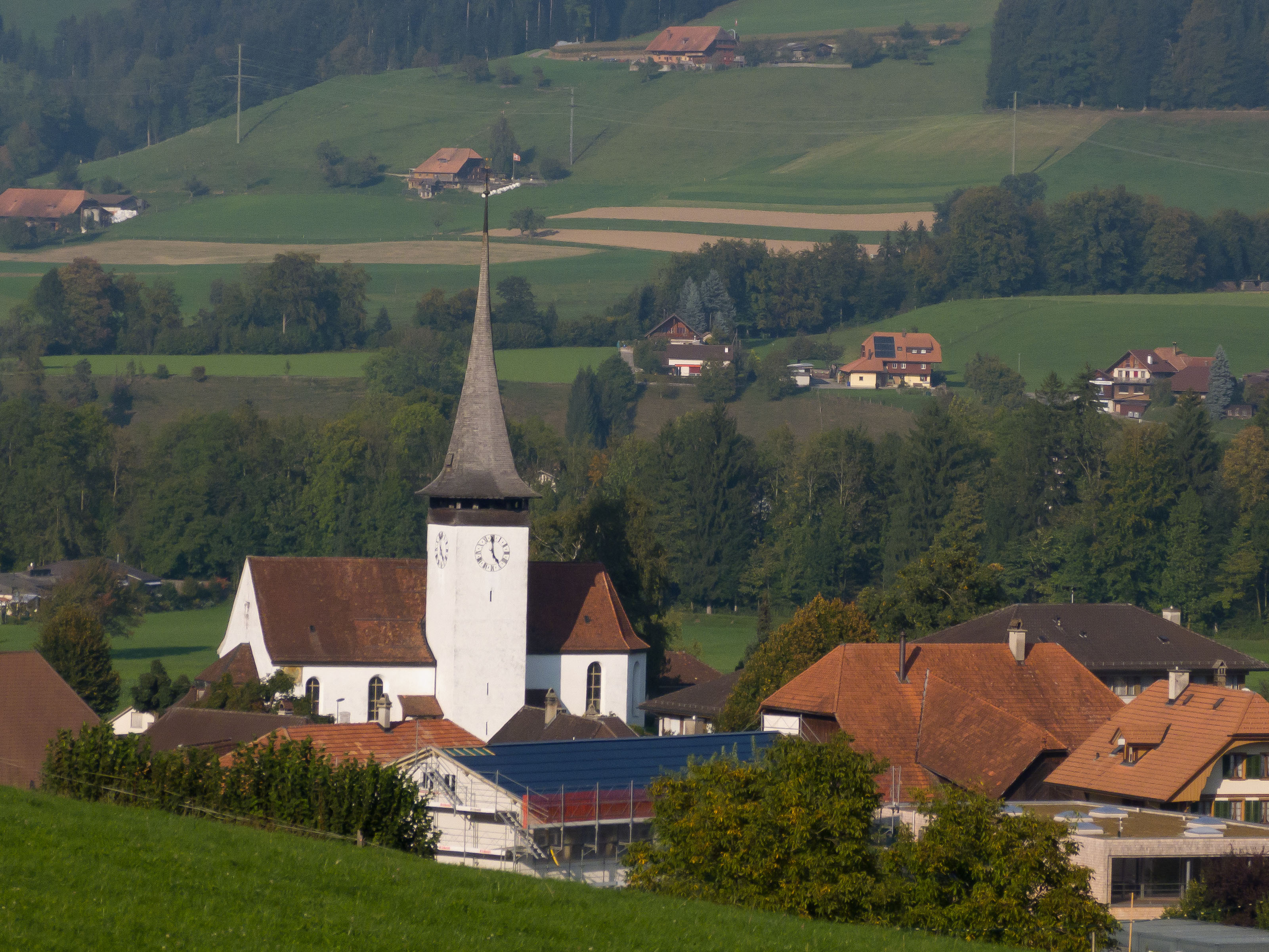 Lauperswil, Kirche, Fernsicht vom Burgweg